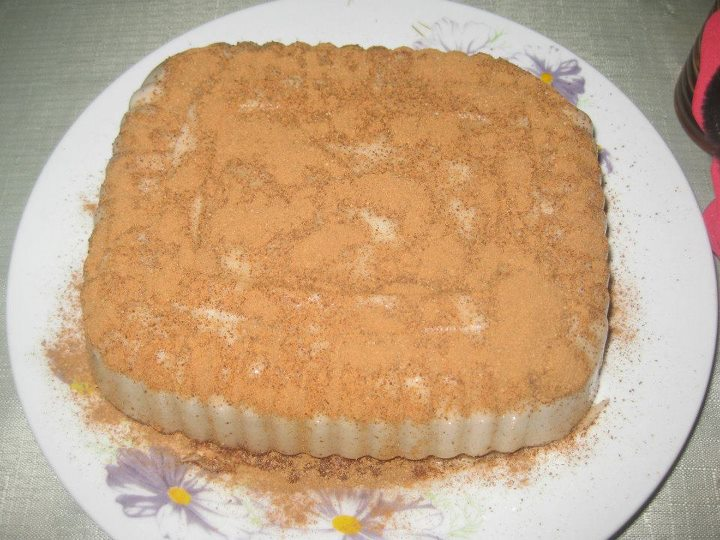 postre